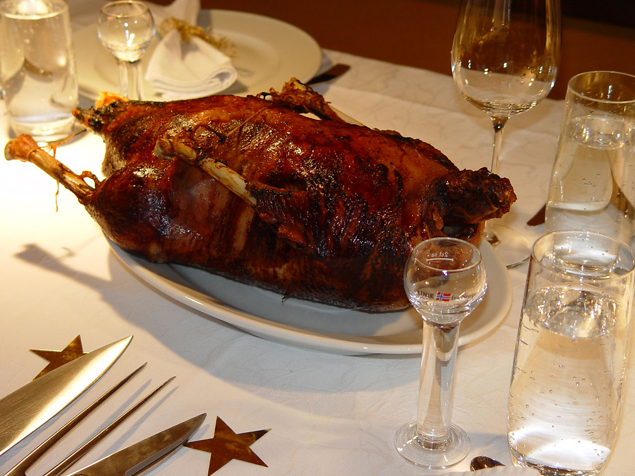 Christmas goose (Weihnachtsgans)